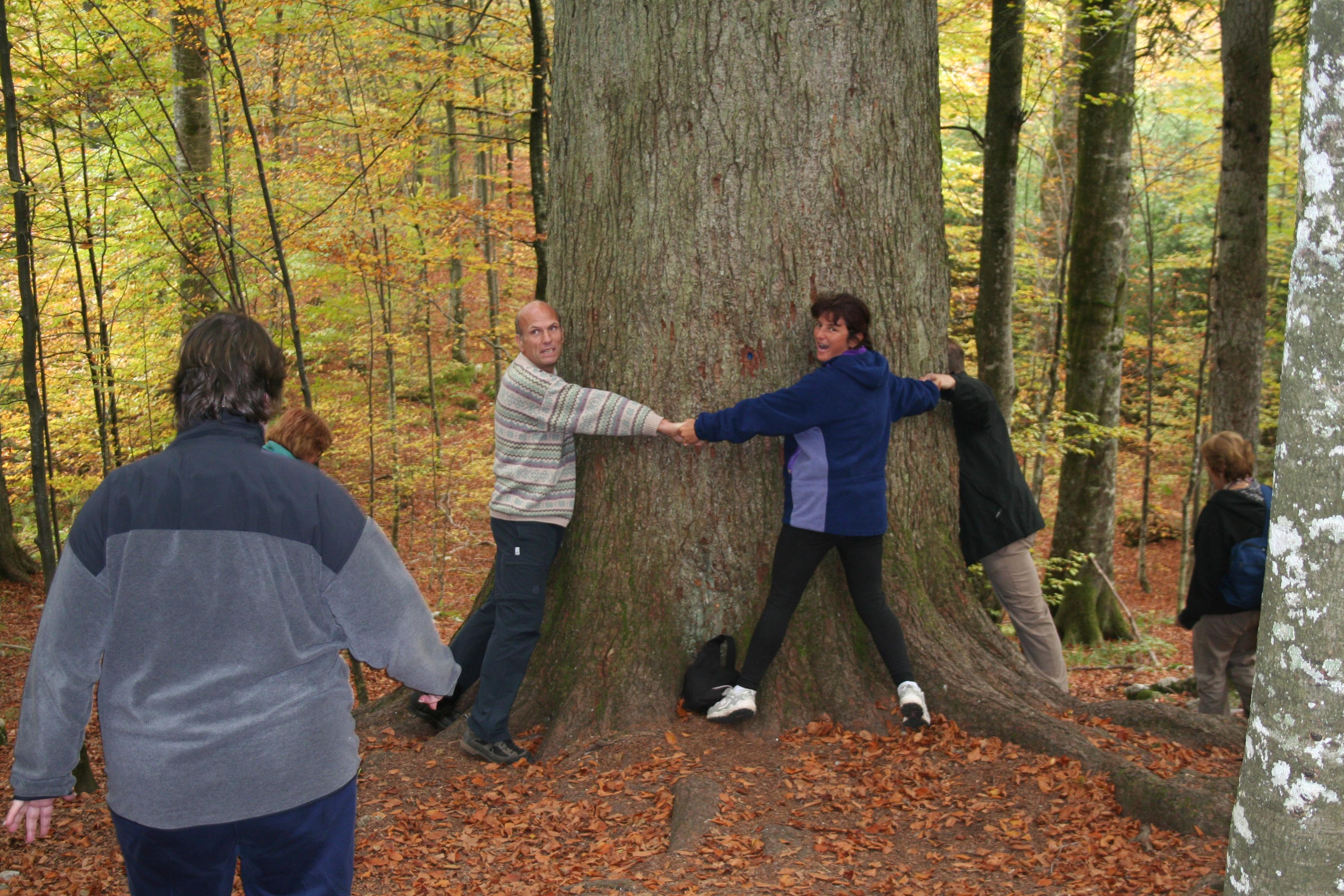 Rajhenavska jelka, Kočevski Rog.